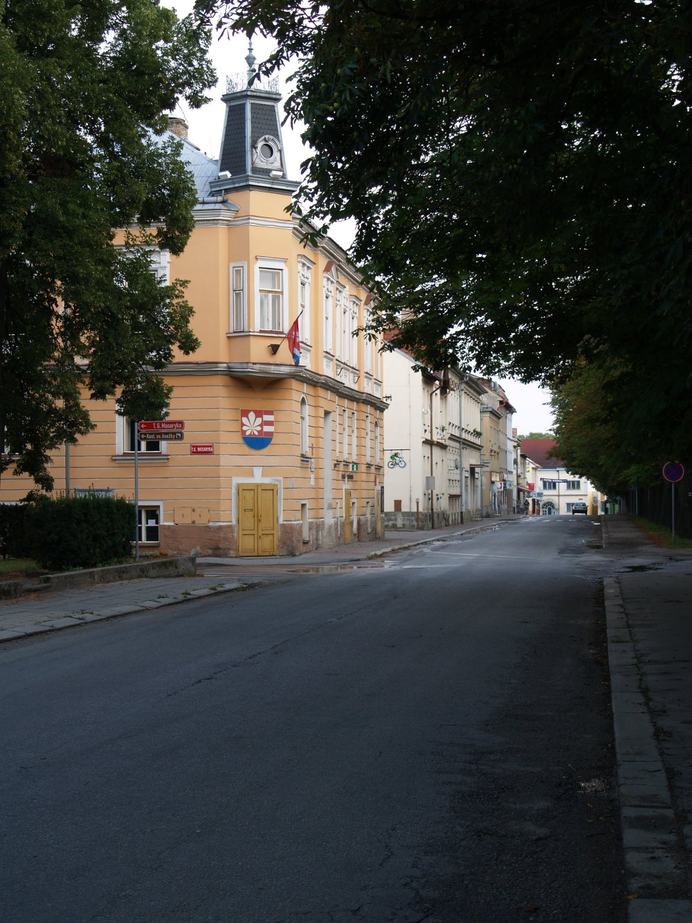 Rathaus in České Velenice, Revoluční 228.